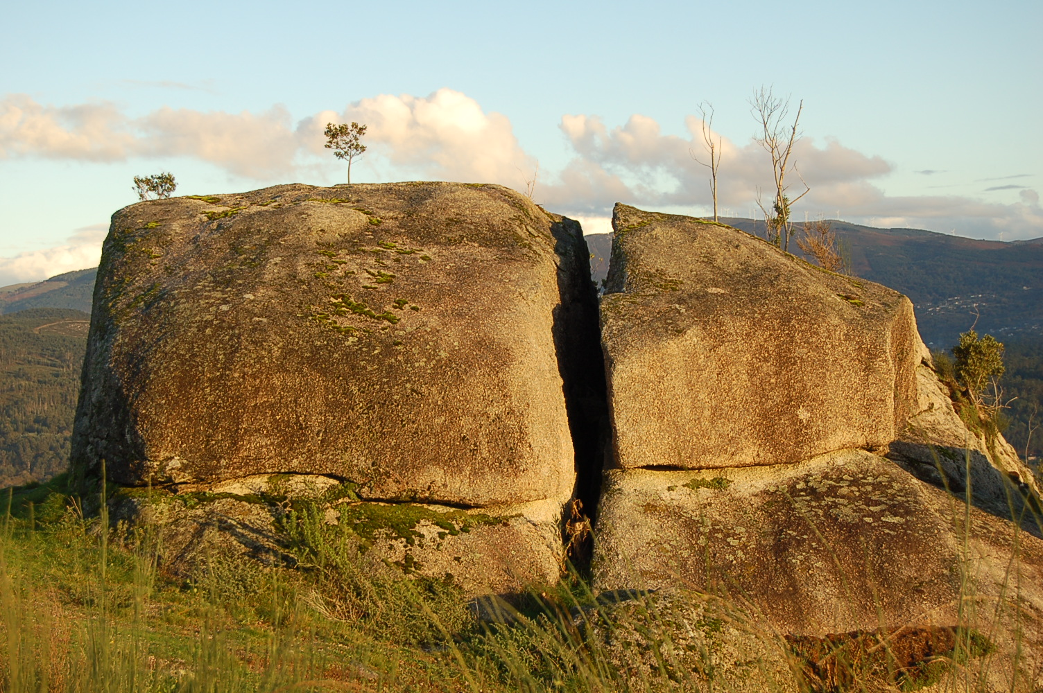 Penedo na Picaraña, Ponteareas.